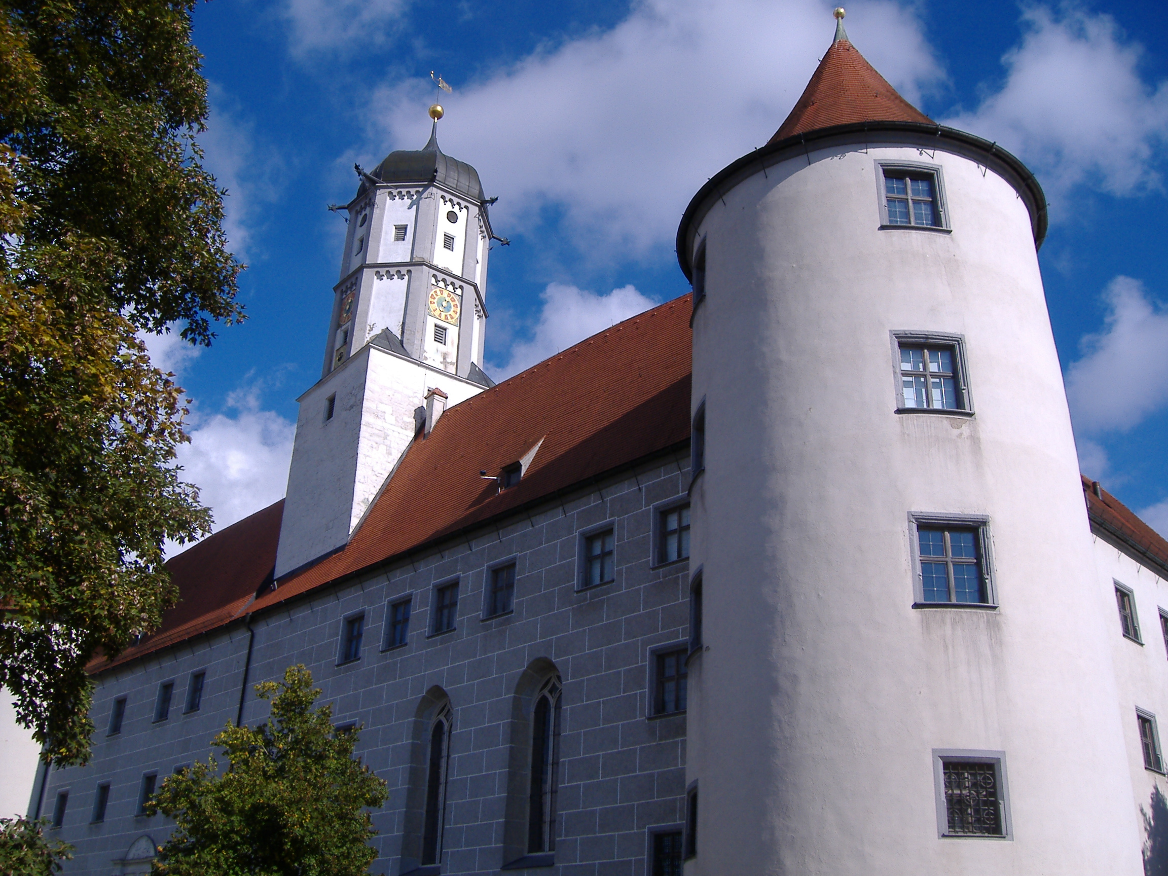 Höchstädt